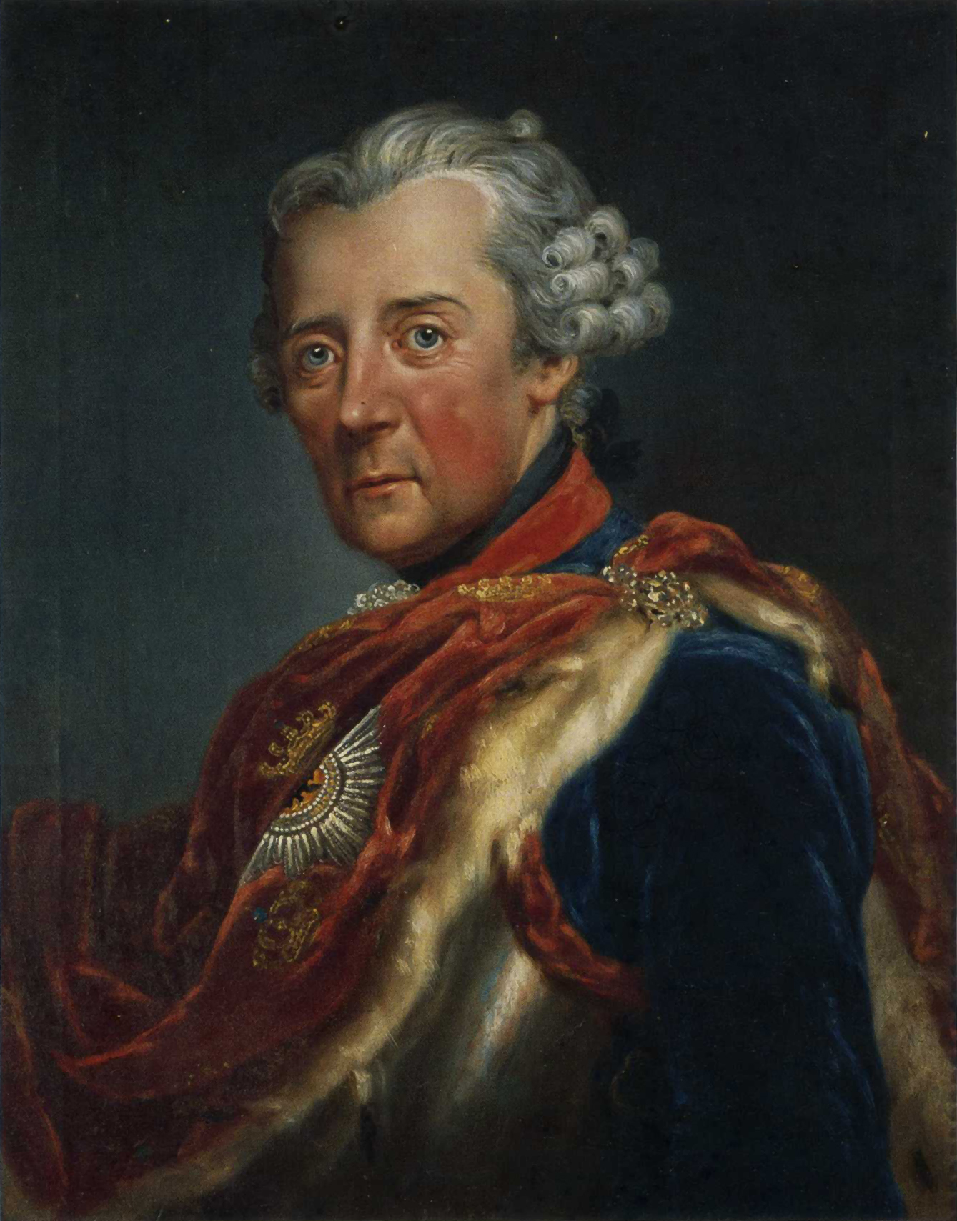 Friedrich II